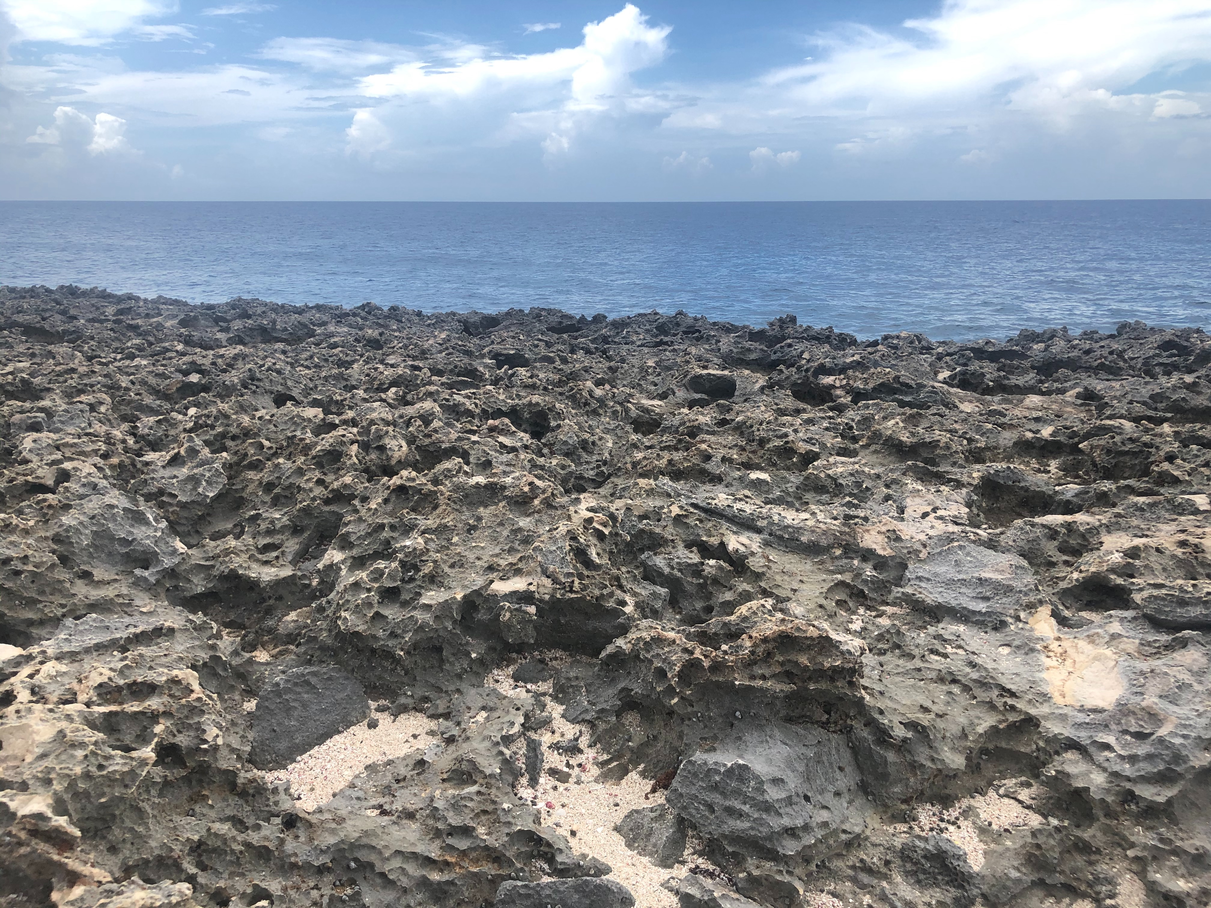 Curaçao, October 2019